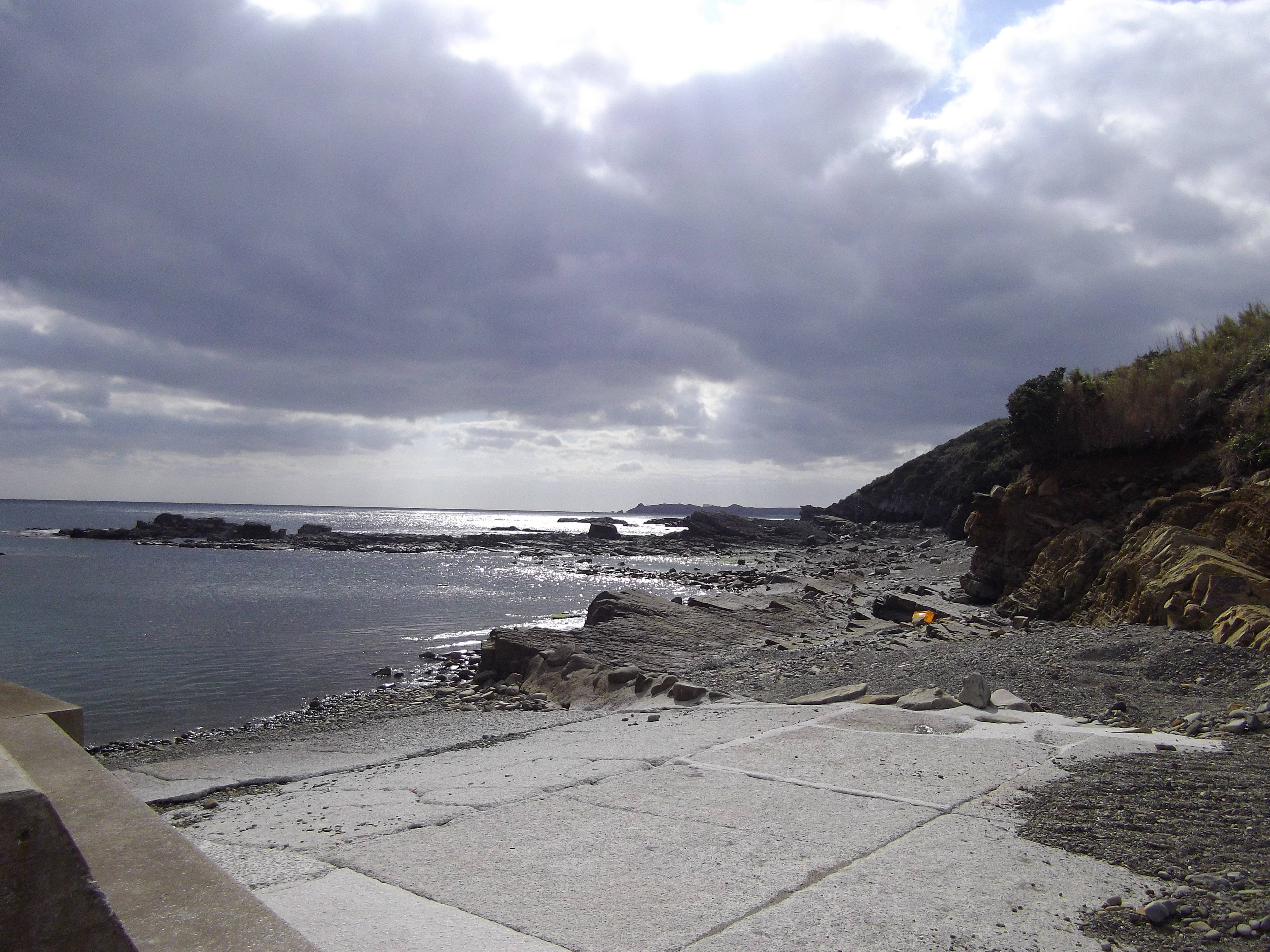 油久海岸、南向き